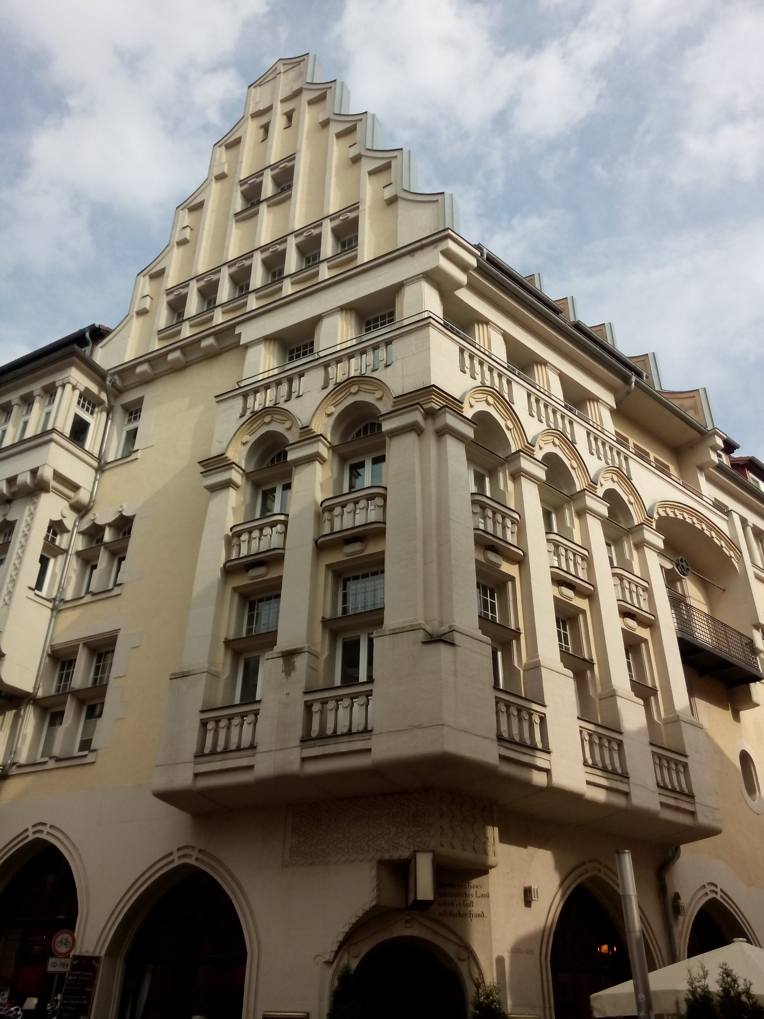 19053 Schwerin, Schloßstraße 17